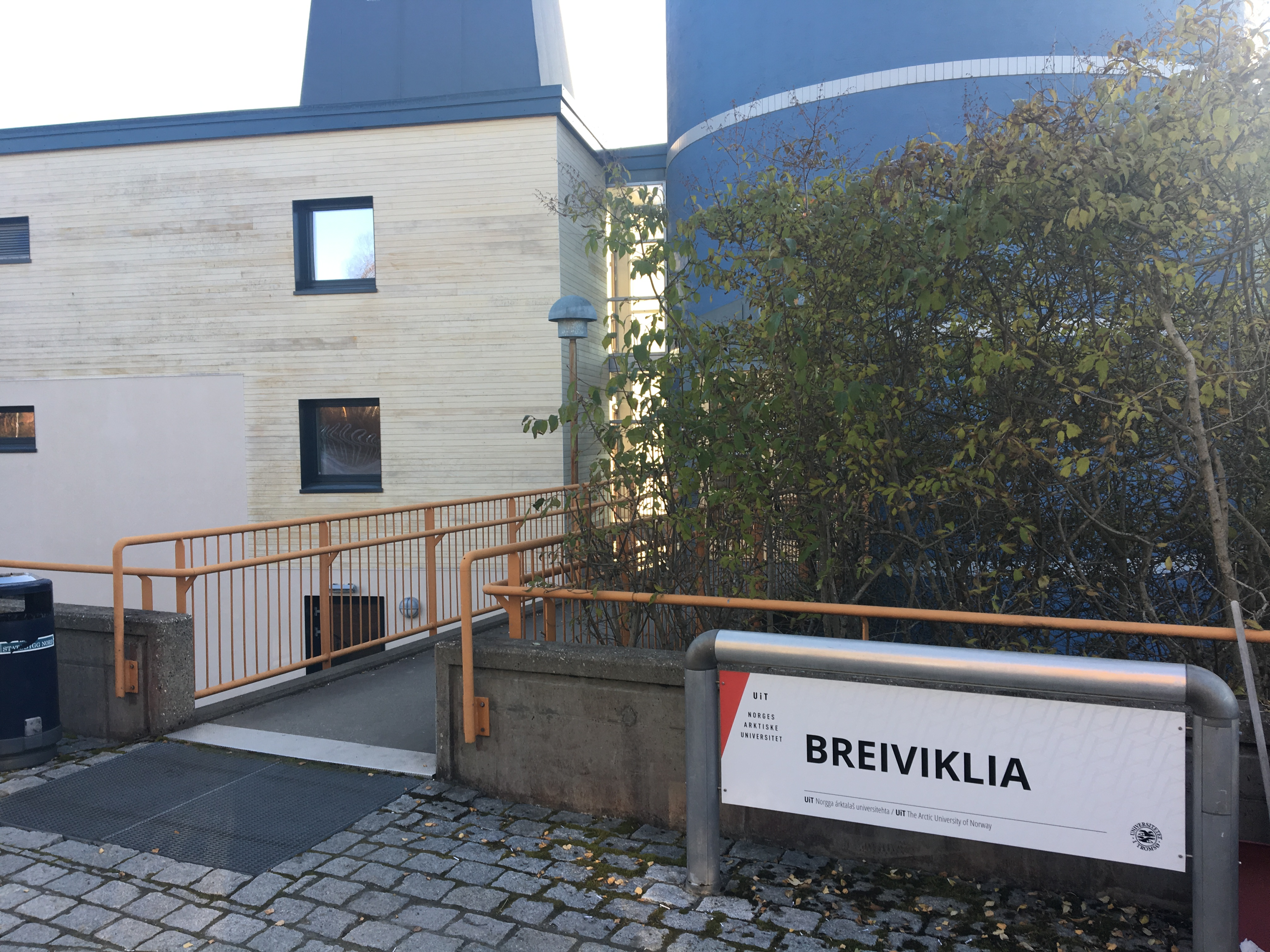 AHR deler bygg med Kvinnforsk, Institutt for språk og litteratur, og studenthelsetjenesten ved UiT.